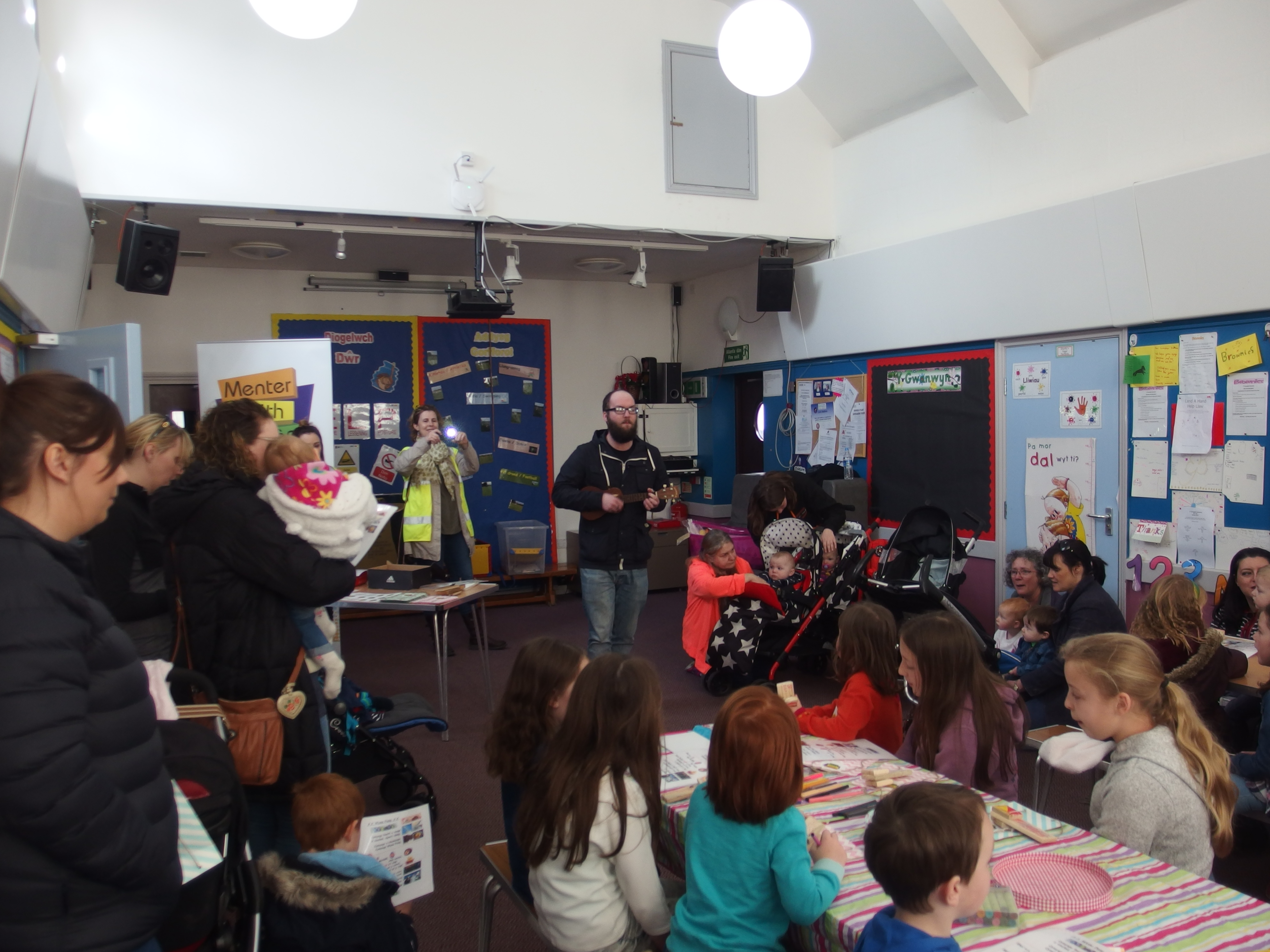 Clapio Wyau yng Ngharreg Lefn